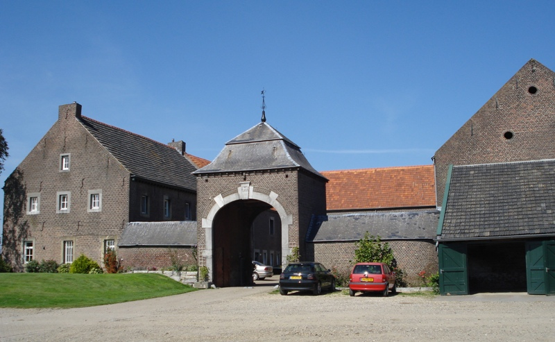 Rijksmonument 28052 - Wiegershof 1, Maastricht.